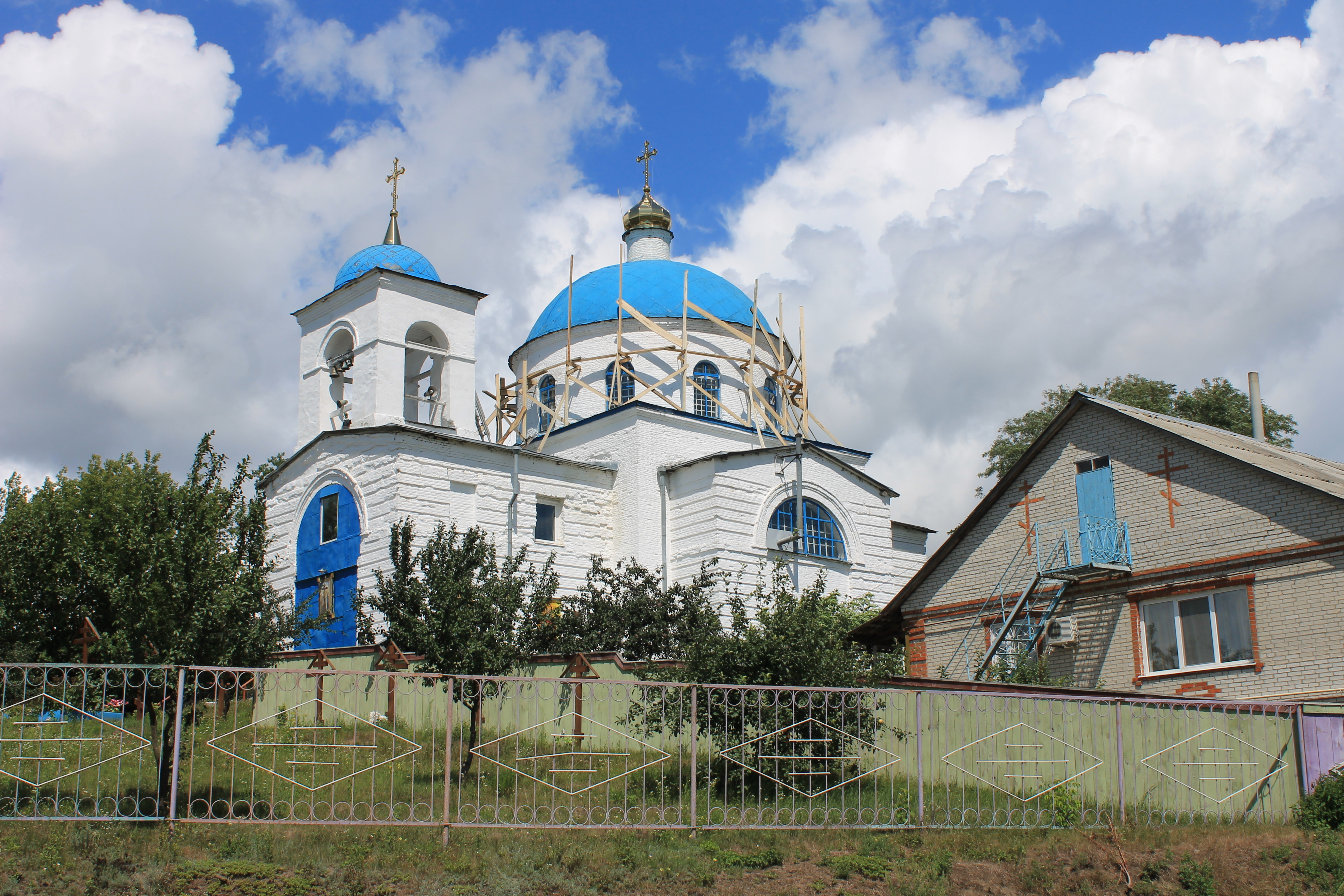 Хрестовоздвиженська церква 1821р., с.Боромля, Тростянецький р-н., Сумська обл.